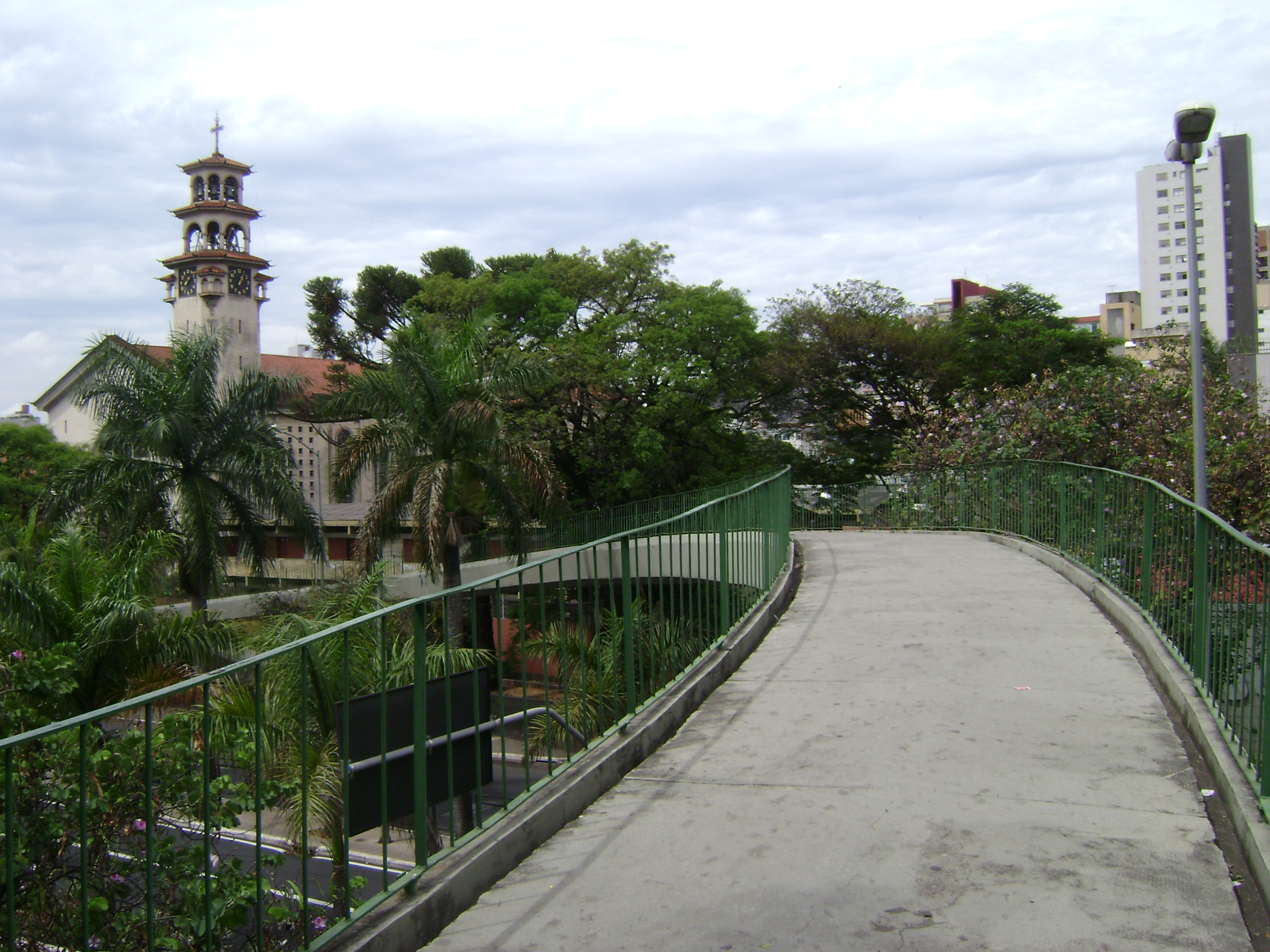 Passarela sobre a avenida Nossa Senhora do Carmo, Belo Horizonte.